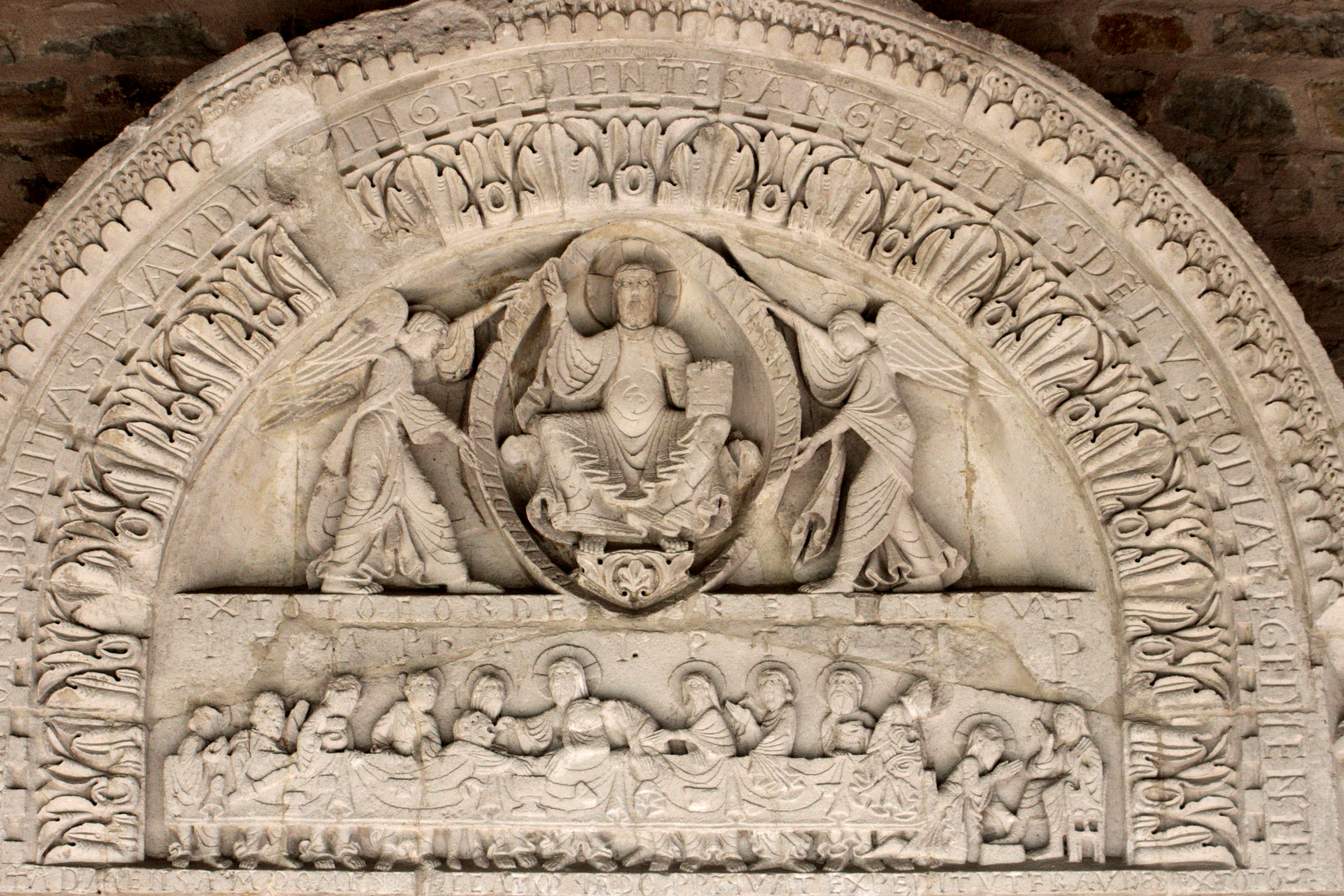 Tympan roman (XIIe siècle) de l'église de Vandeins, département de l'Ain, France